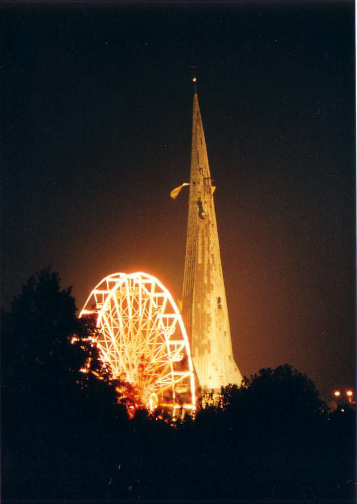 Delbrücker Kirche und Riesenrad am Katharinenmarkt